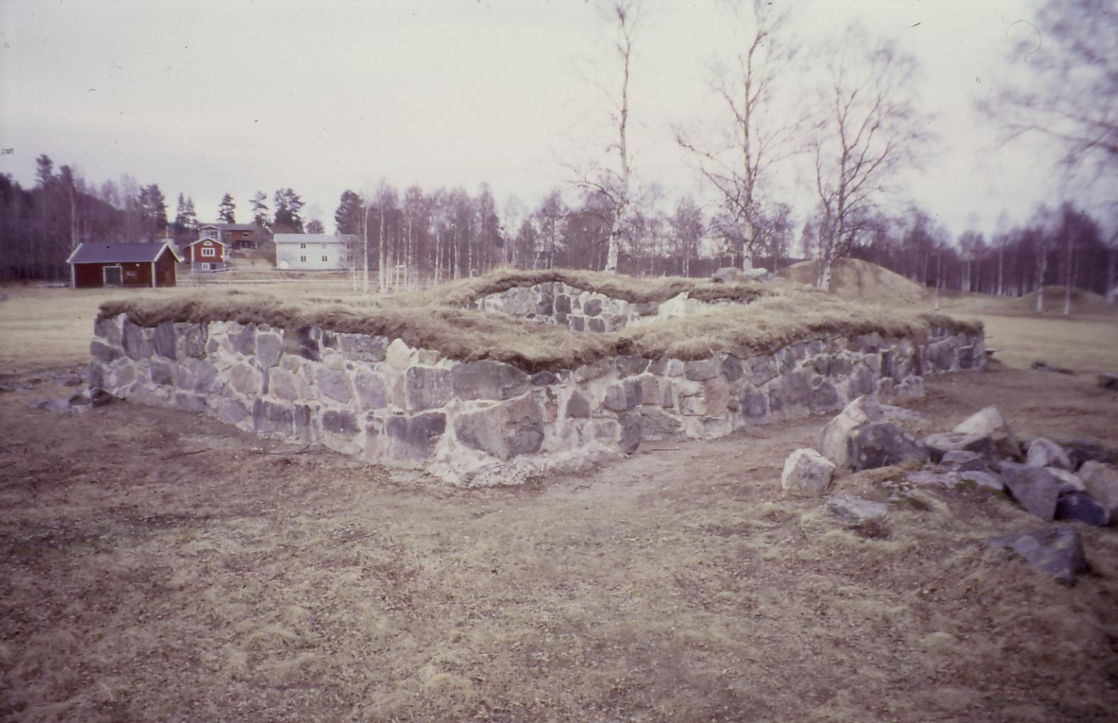 Kvissle kapell från omkr år 1200 i riksintresset Kvissle-Nolby-Prästbolet. Fotograferad av Kabam med en Konica Pop.